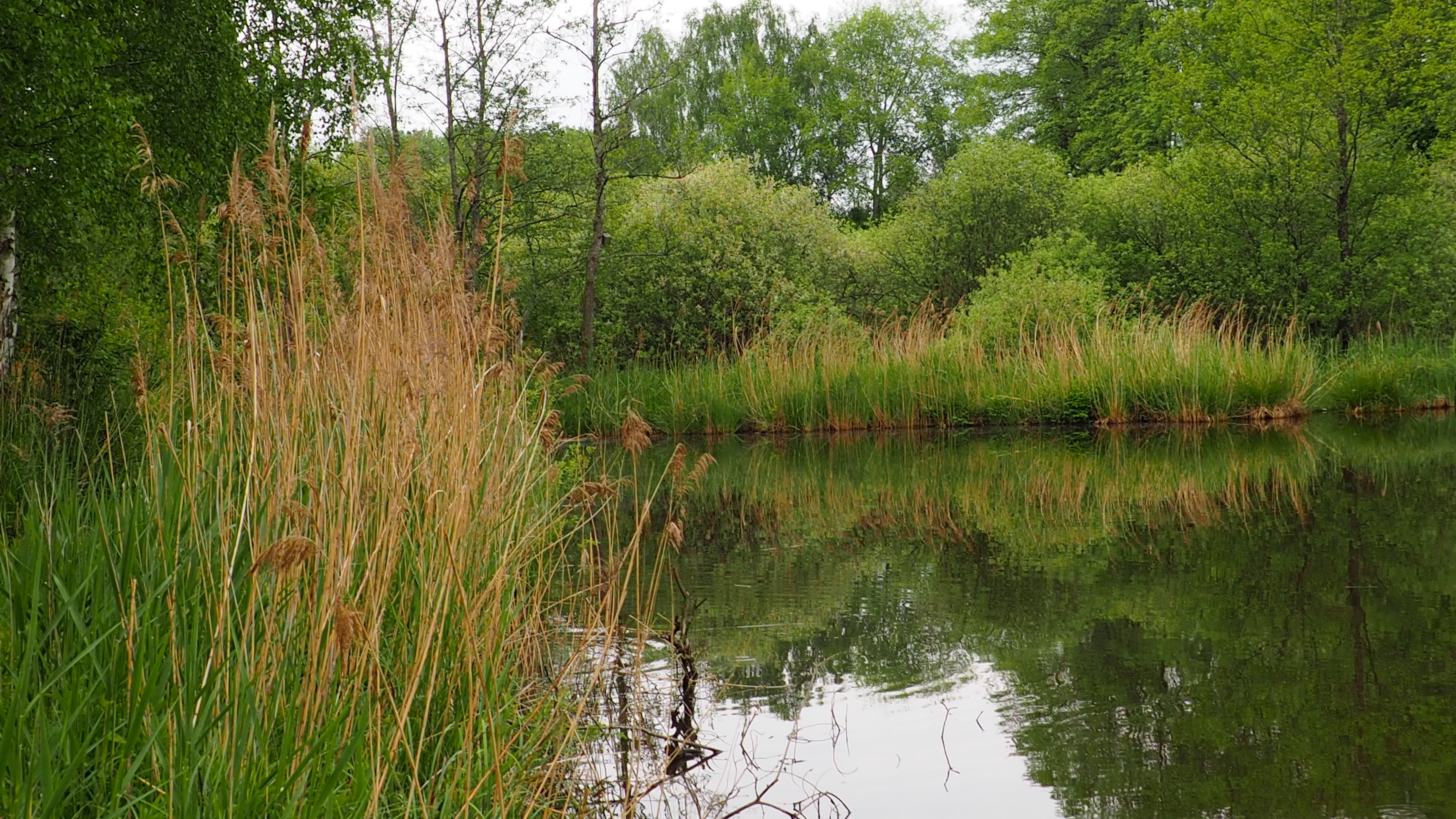 Teich im Landschaftsschutzgebiet Heiligenstädter Moos.